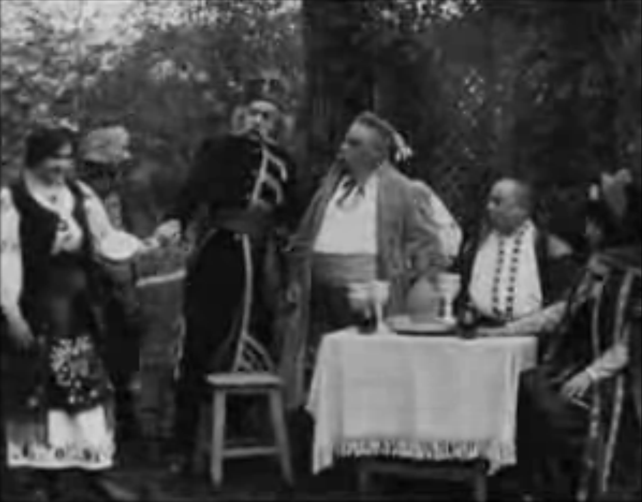 Kadr z filmu Mazepa z 1909 roku w reżyserii Wasilija Gonczarowa (Mazepa prosi ojca Marii Koczubeja o rękę dziewczyny).